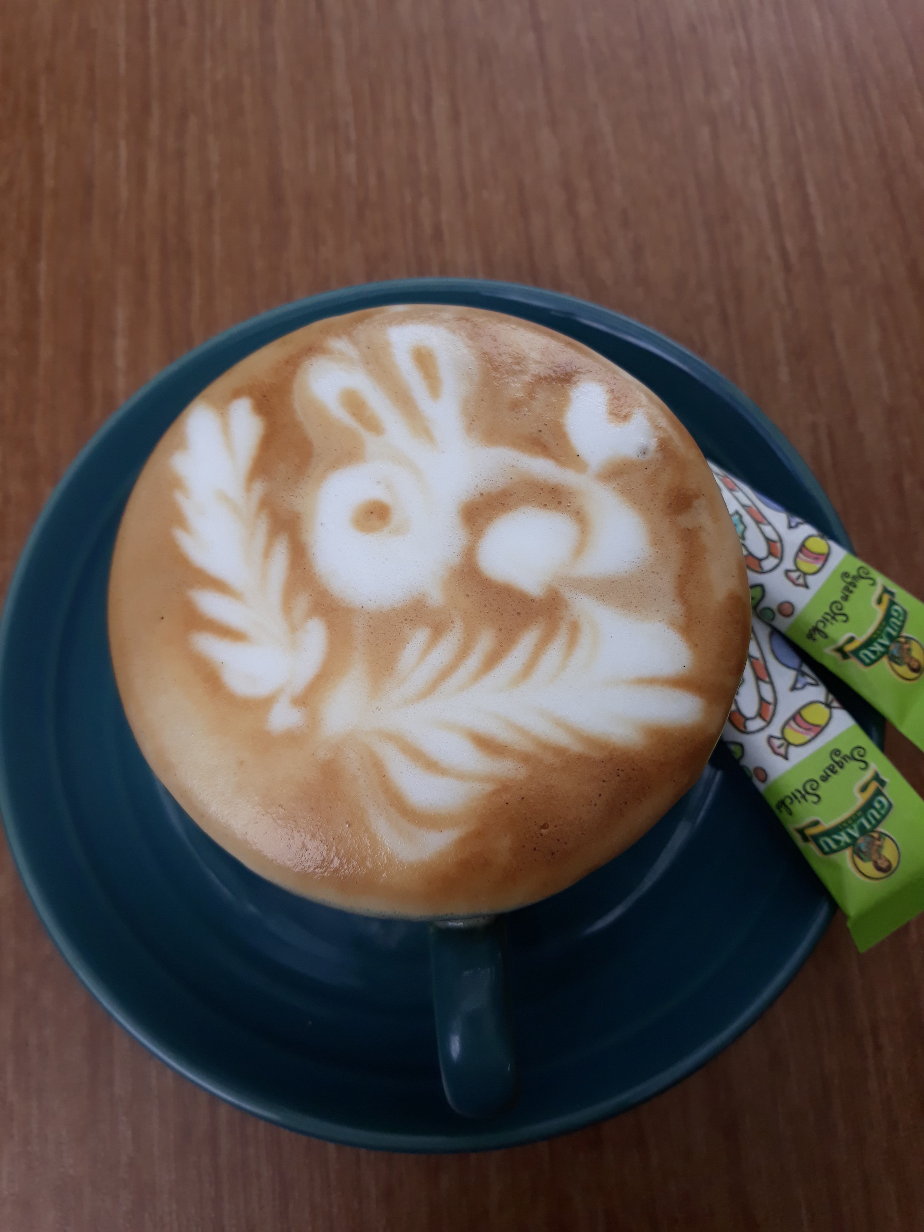 Basa Jawa: Caramel Latte iku salah sawijining kopi kang bisa digambari.